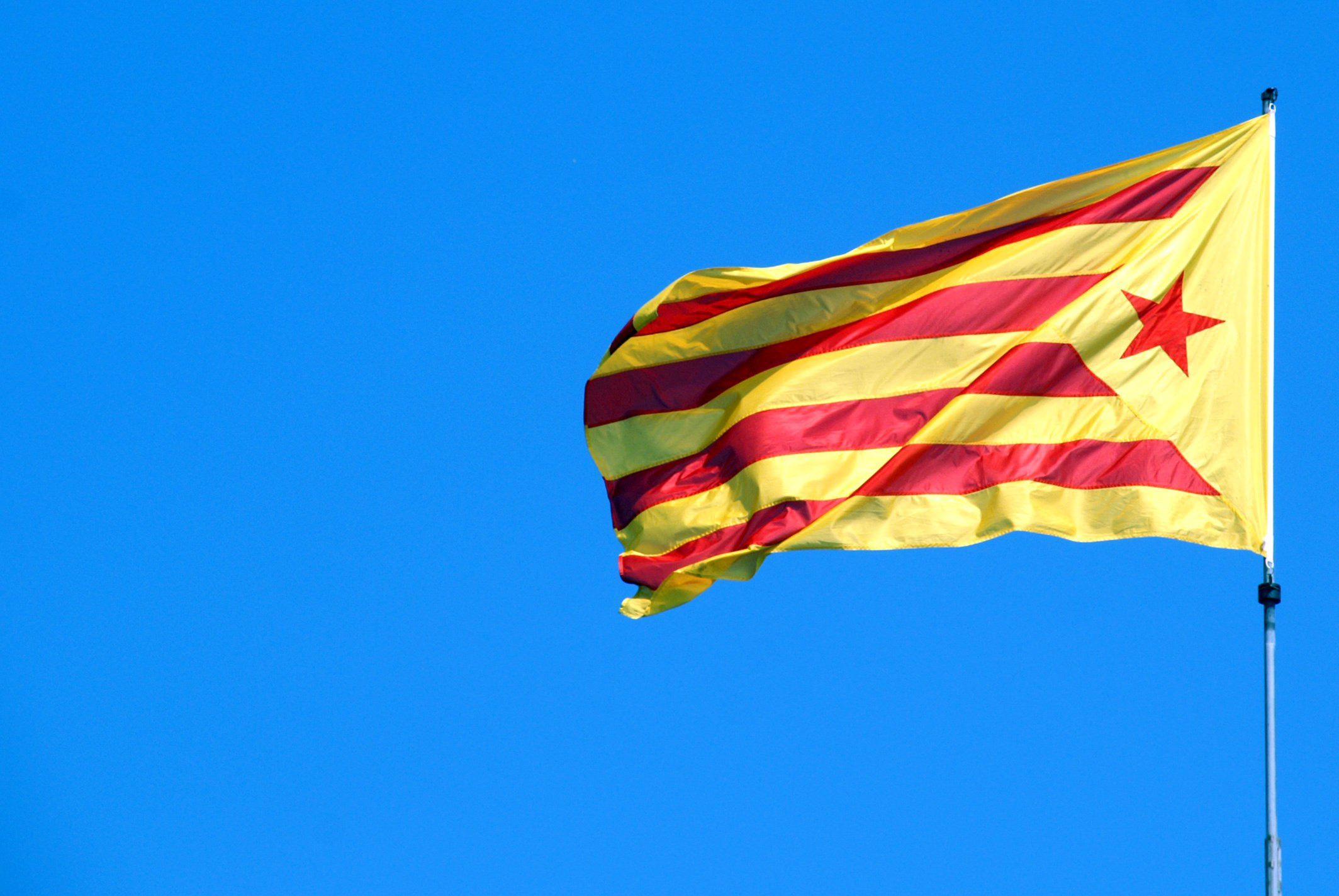 Estelada onejant a Blanes, l'11 de setembre de 2007